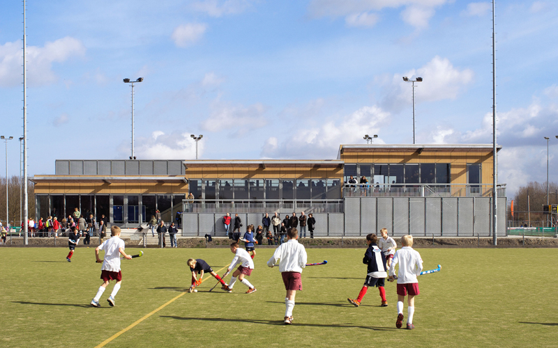 Almeerse Hockey Club, D-jeugd